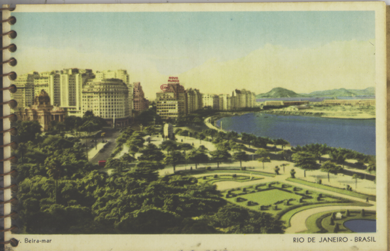 Obra que integra o acervo do Museu Paulista da USP. Coleção Werner Haberkorn